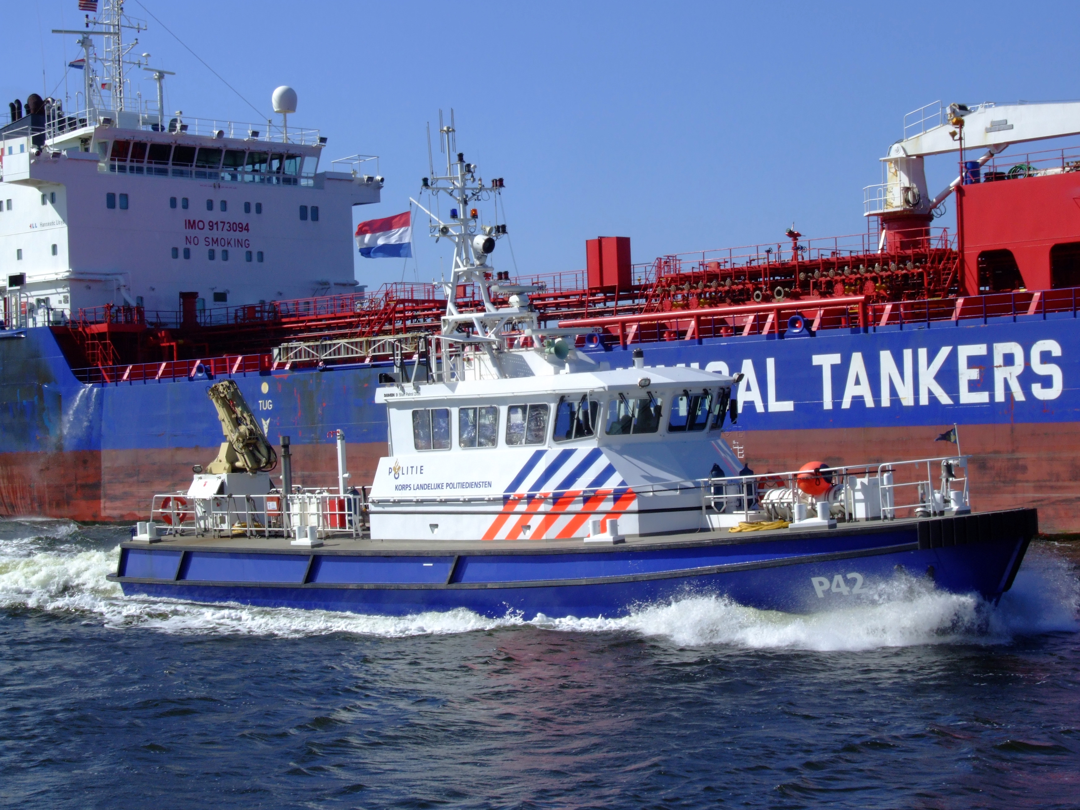 Politie boot P42